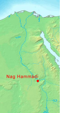 Mapa egyptského archeologického naleziště Nag Hammádí. K úpravě mapy byl použit software DEMIS World Map Server